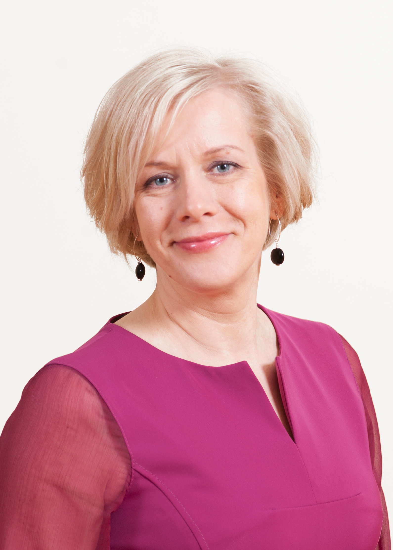 Monika Haukanõmm